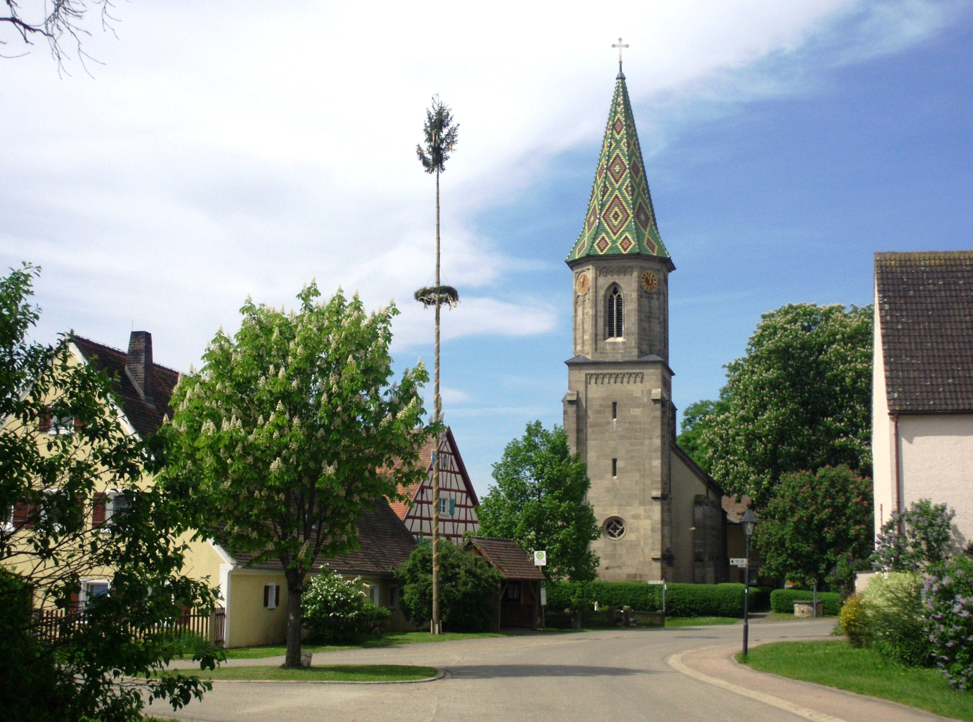 Sausenhofen, Ortsteil von Dittenheim in mittelfränkischen Landkreis Weißenburg-Gunzenhausen (Bayern), an der Evang.-Luth. Kirche St. Michael